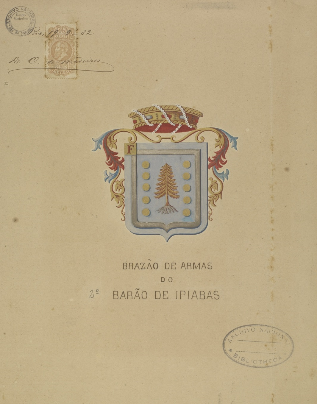 Brasão de Francisco Pinheiro de Souza Werneck, Barão de Ipiabas (RJ). Fundo: Brasões.